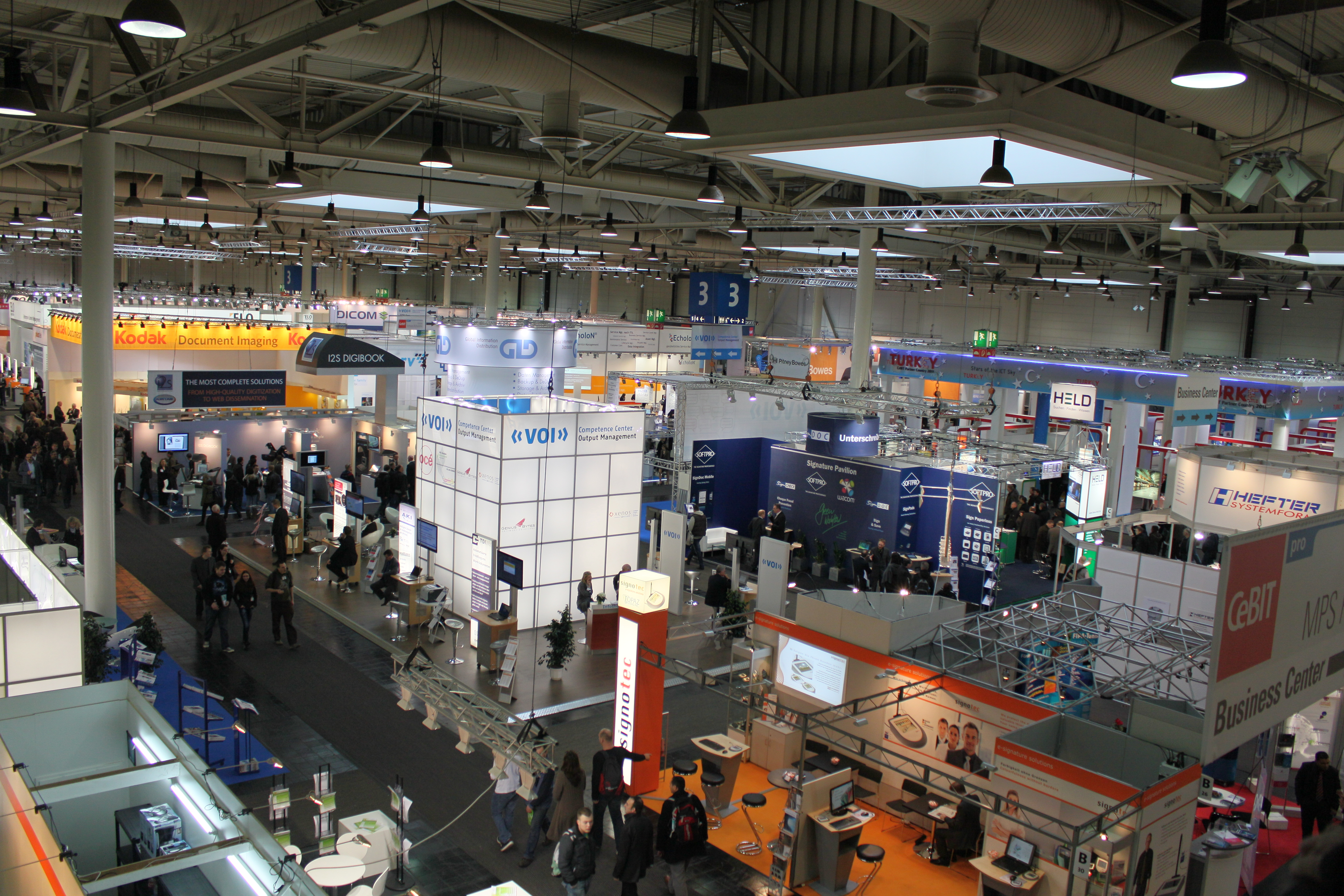 CeBIT 2011